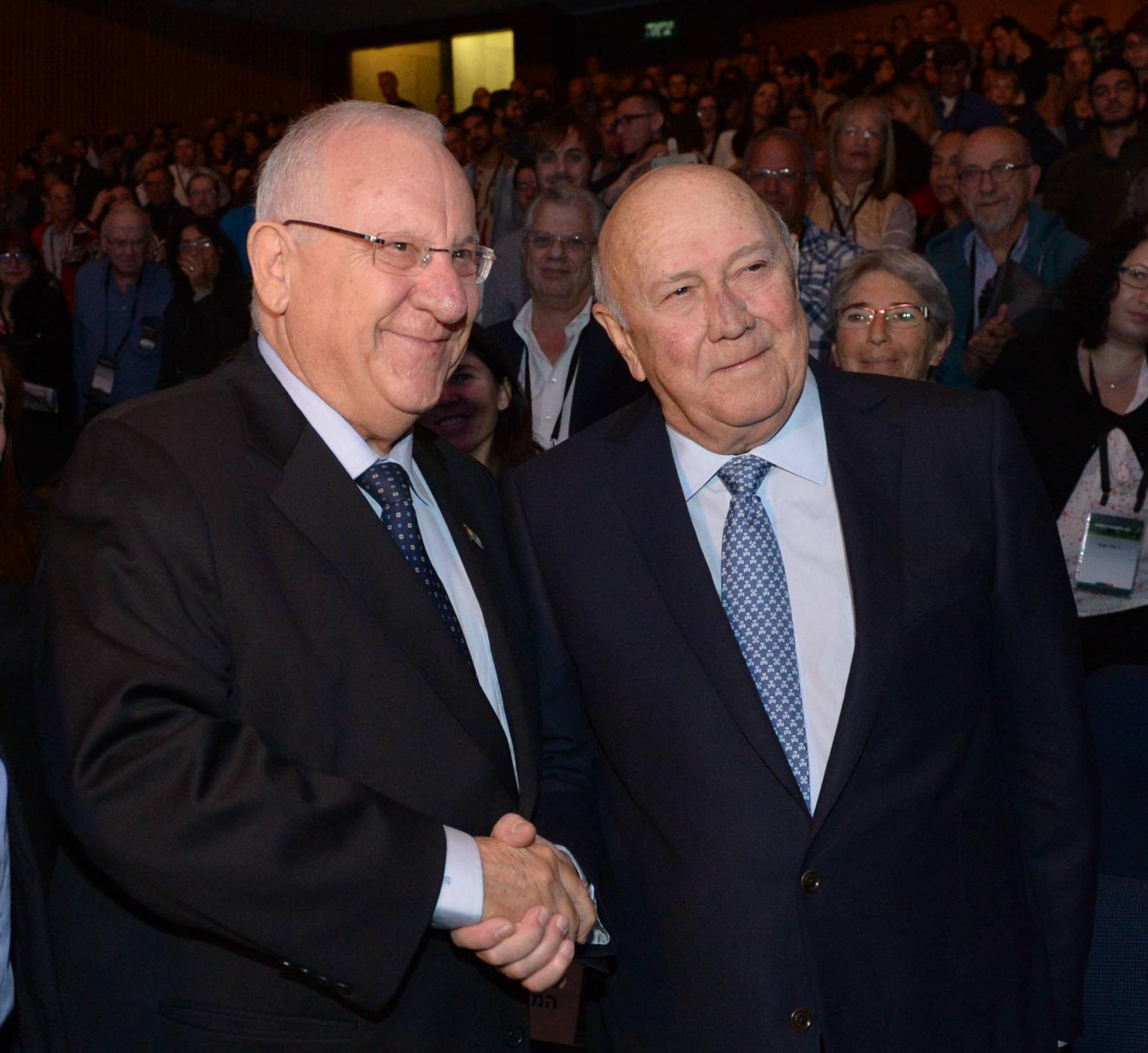 נשיא מדינת ישראל ראובן ריבלין עם נשיא דרום אפריקה לשעבר פרדריק וילם דה קלרק.